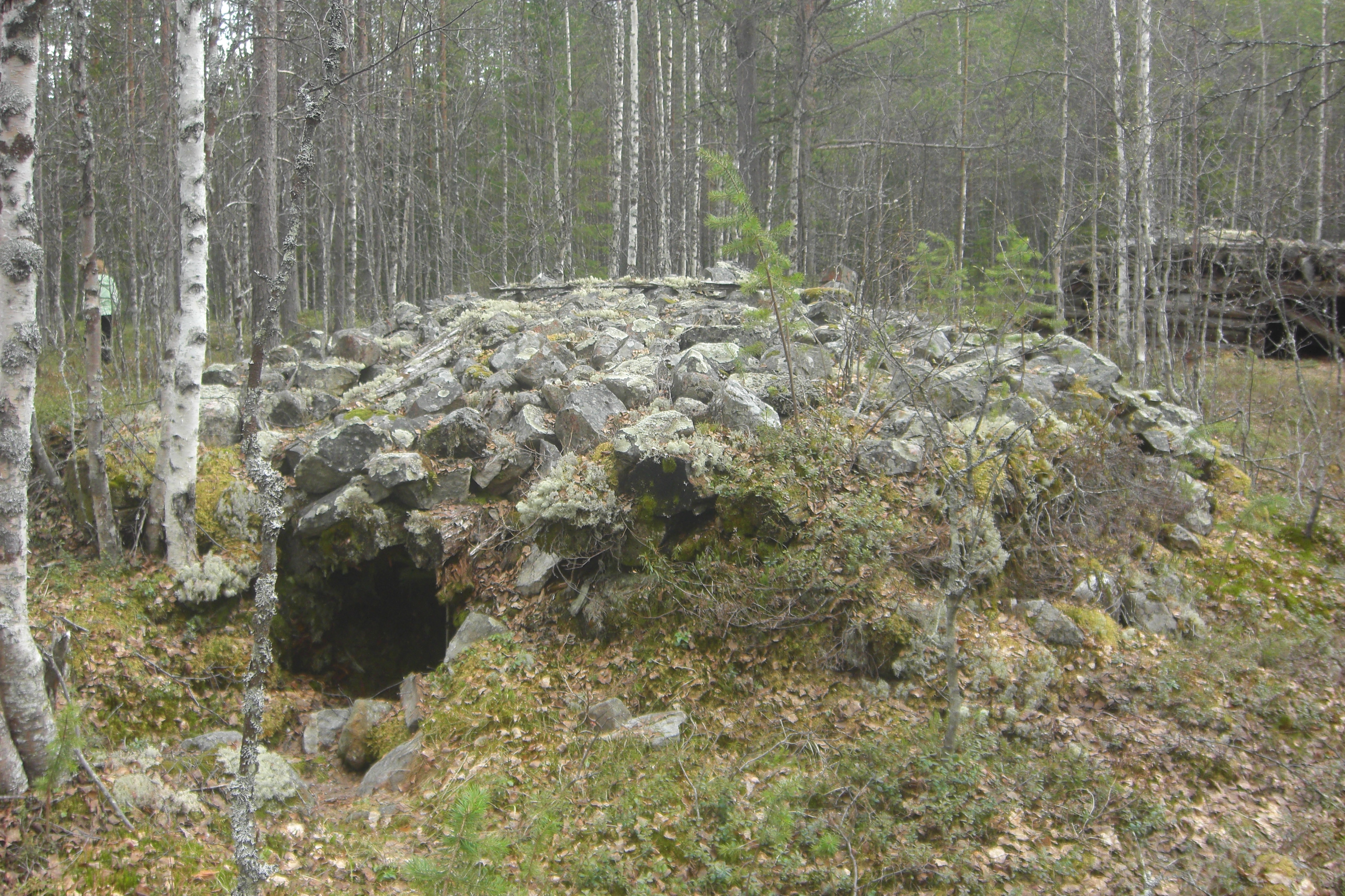 Верманский рубеж. Места боёв во 2-й мировой войне на реке Верман в Мурманской области. Остатки блиндажей. Состояние 25 Мая 2009